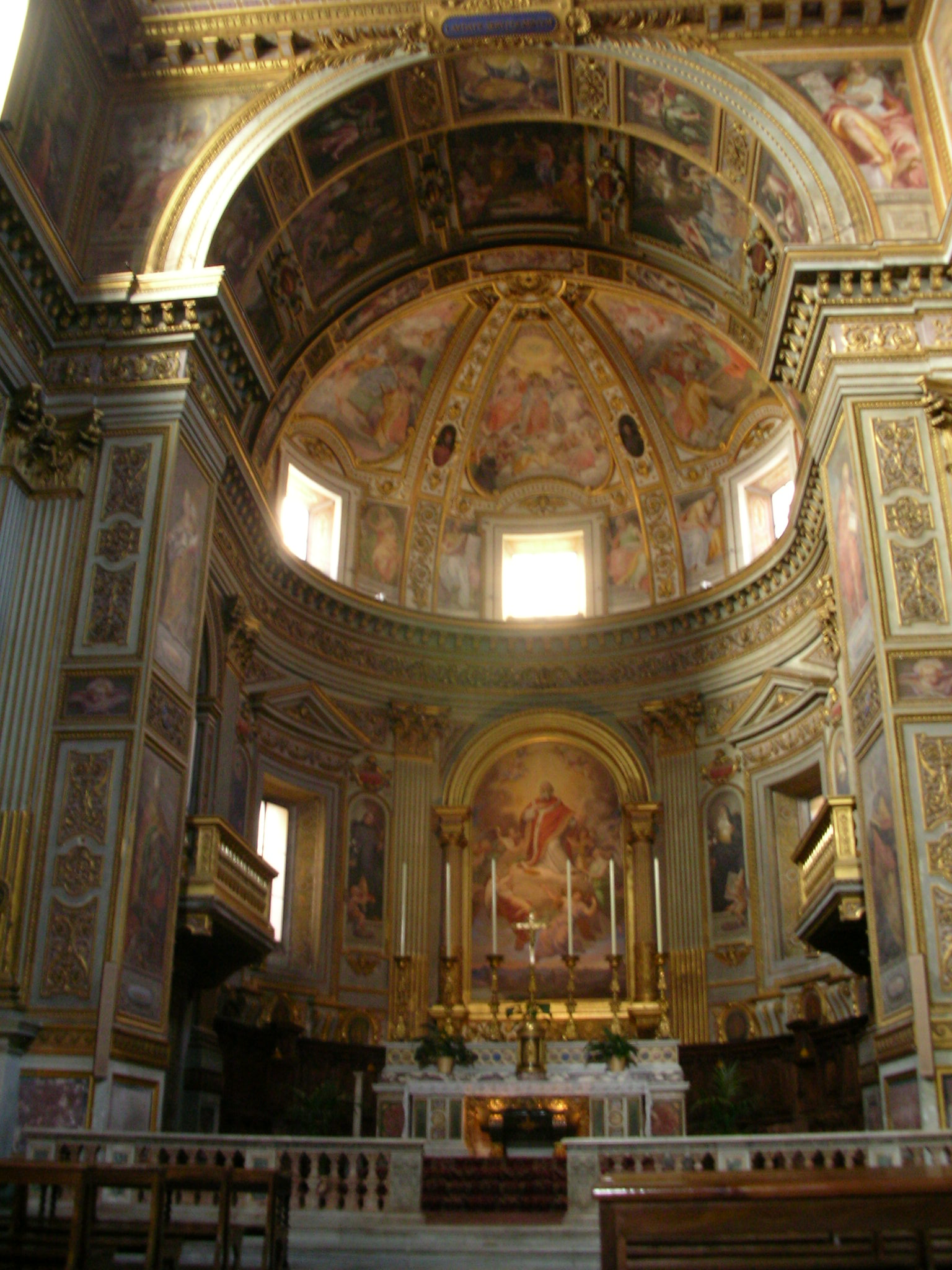 Main Altar, San Marcello al Corso, Rome